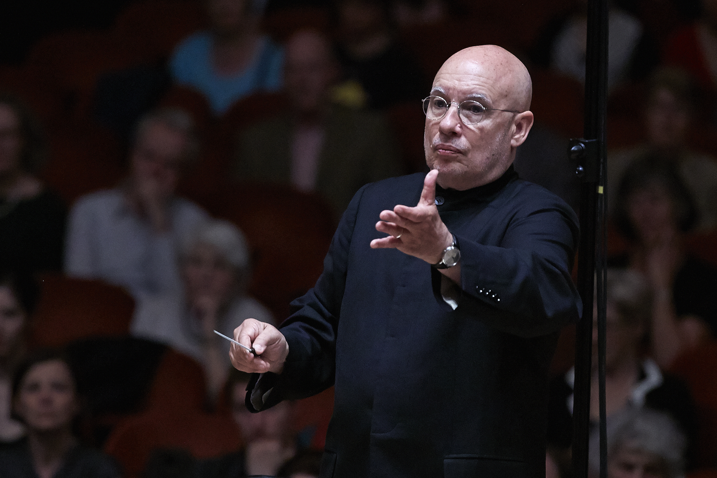 Dennis Russell Davies, aktueller Chef-Dirigent des Sinfonieorchesters Basel.